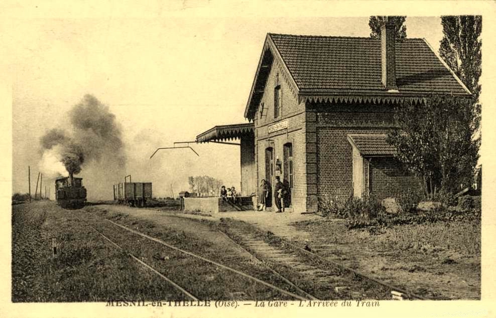 Carte postale de la gare